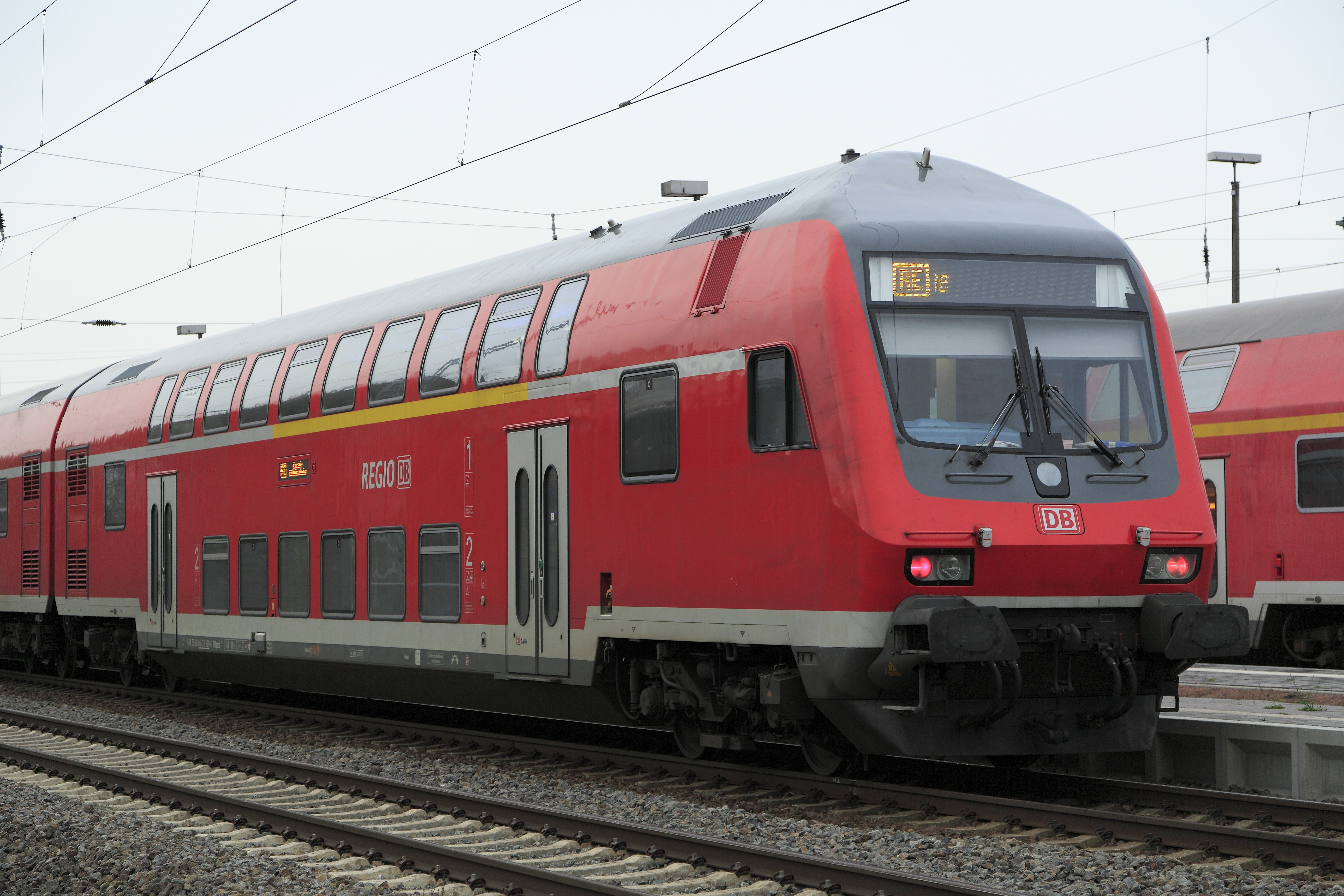 Doppelstocksteuerwagen, wegen der Vollsperrung des Bahnhofes Halle (S) Hbf wenden die Züge zwischen Halle und Kassel-Wilhelmshöhe im Bahnhof Angersdorf. Die DABpbzfa 762 sind für eine Einstiegshöhe von 550 Millimetern ausgelegt, bei den ähnlichen Wagen insbesondere in NRW mit einer Einstiegshöhe von 760 Millimetern liegen die Türen deutlich höher, außerdem sind mie mit einer Klapptrittstufe ausgerüstet worden.